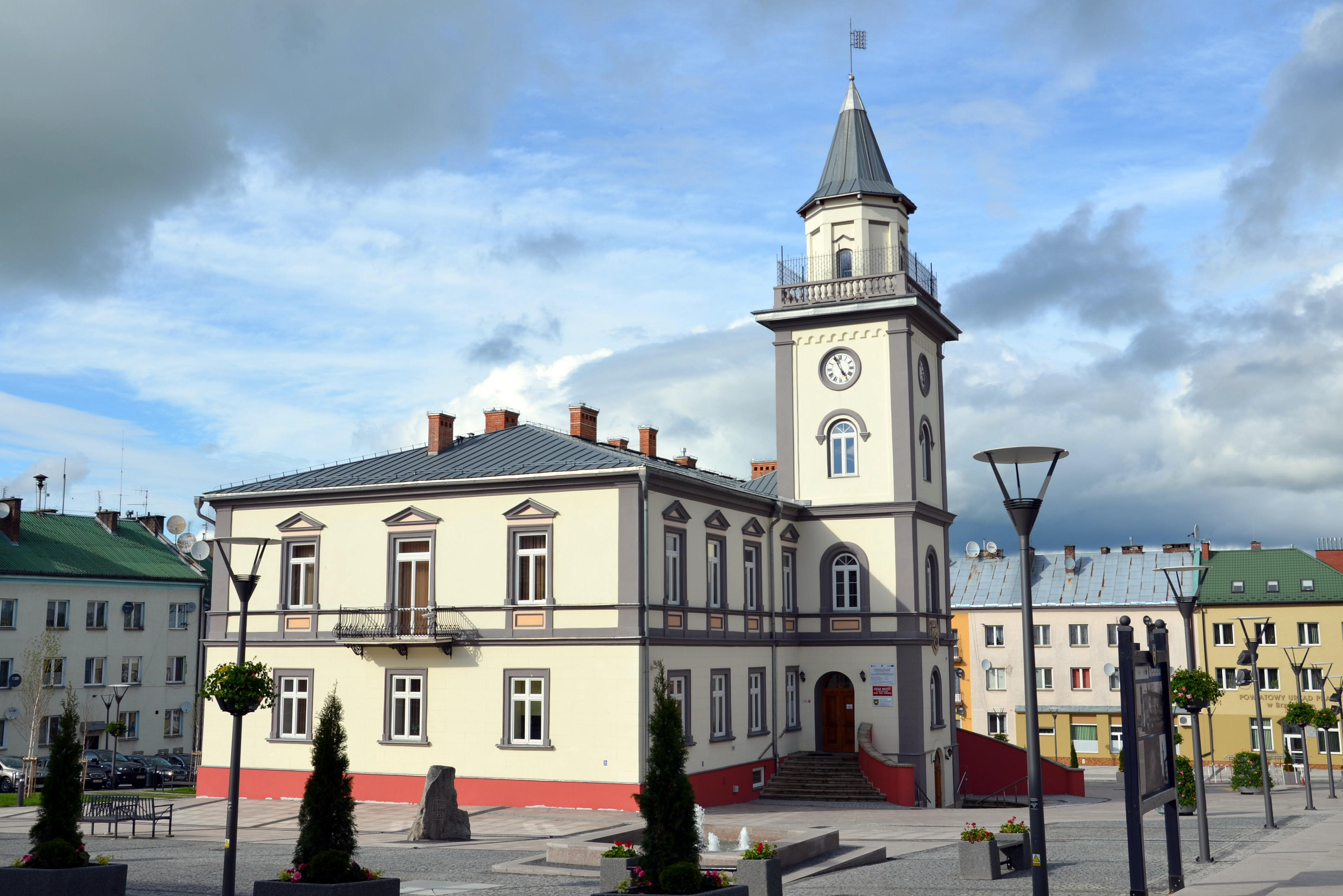 Der Marktplatz mit Rathaus in Brzozow.